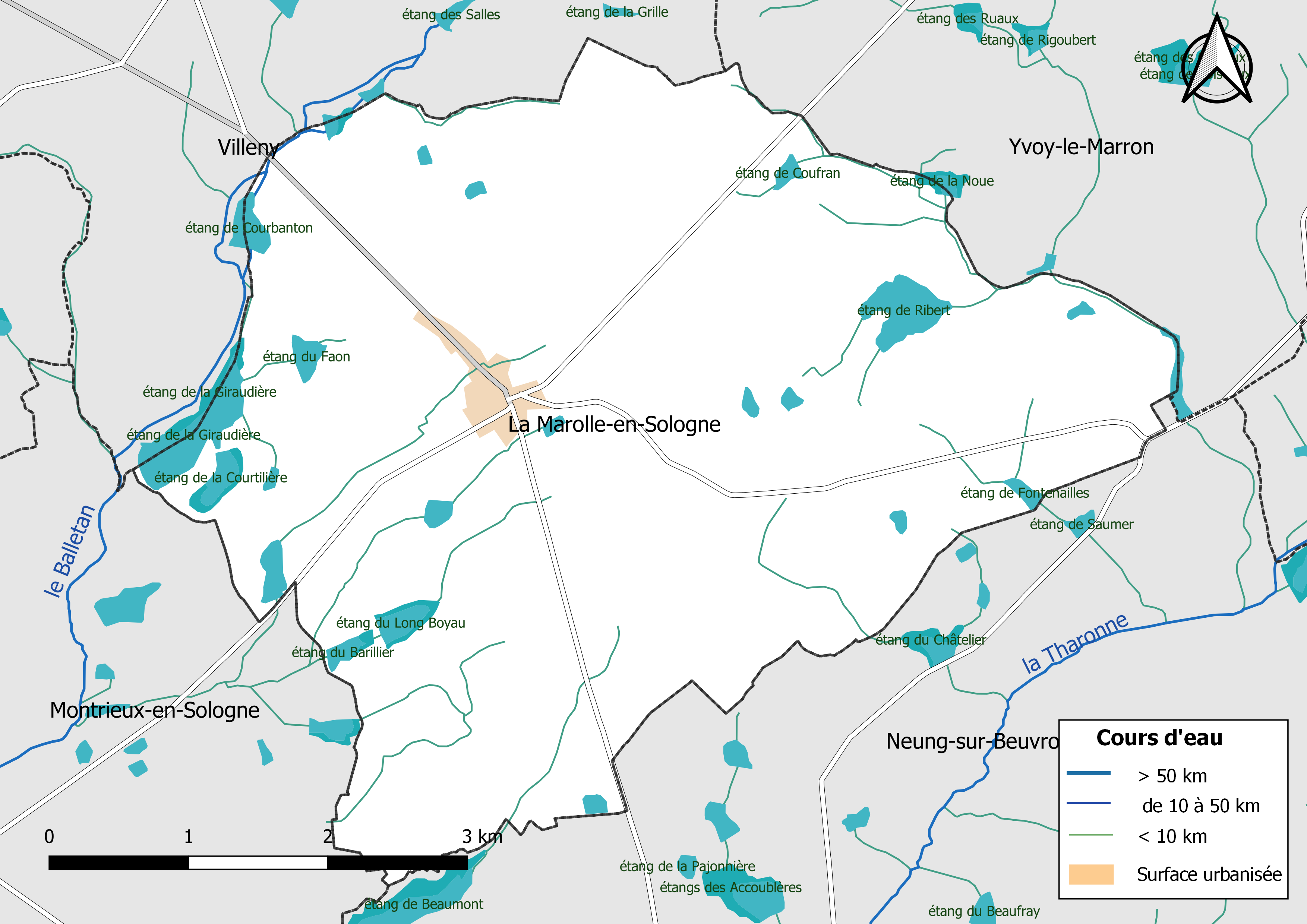 Carte du réseau hydrographique de la commune de La Marolle-en-Sologne (Loir-et-Cher, France).